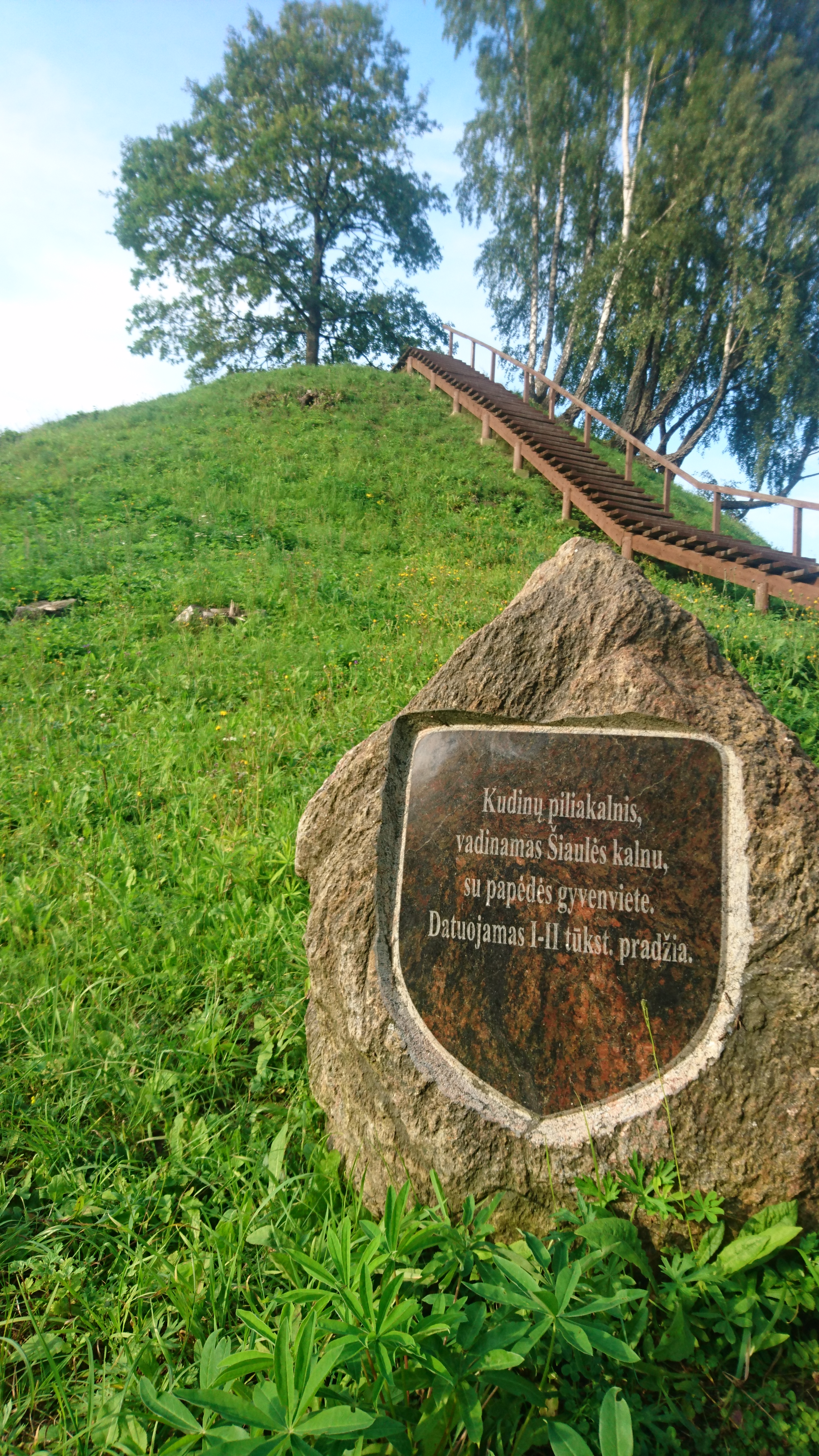 Šiaulės kalnas prie Šiaulėnų